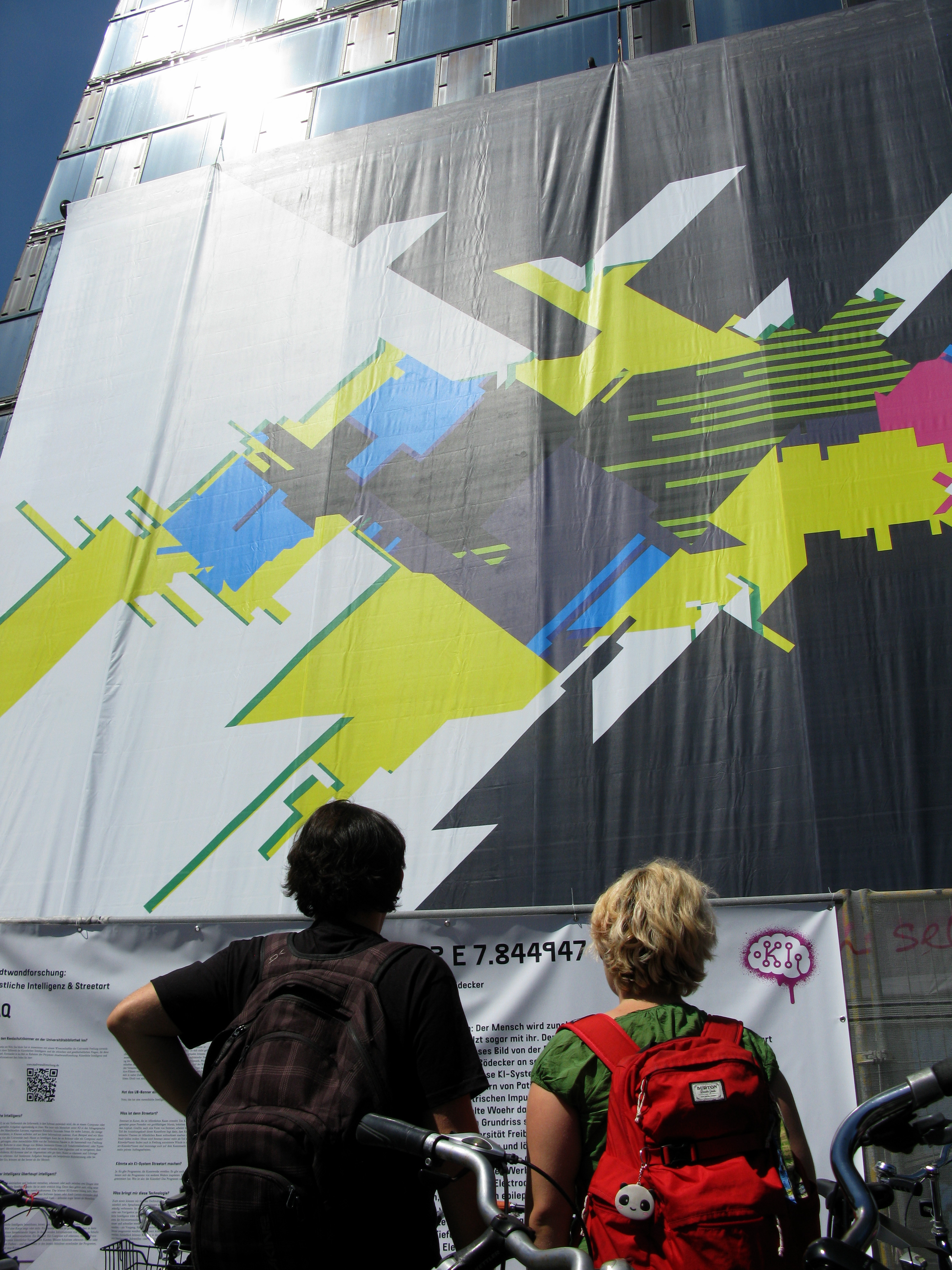 von Marc C. Woehr und Joschka Bödecker künstlerisch gestalteter Blendschutz an der Freiburger Universitätsbibliothek mit Erläuterungen